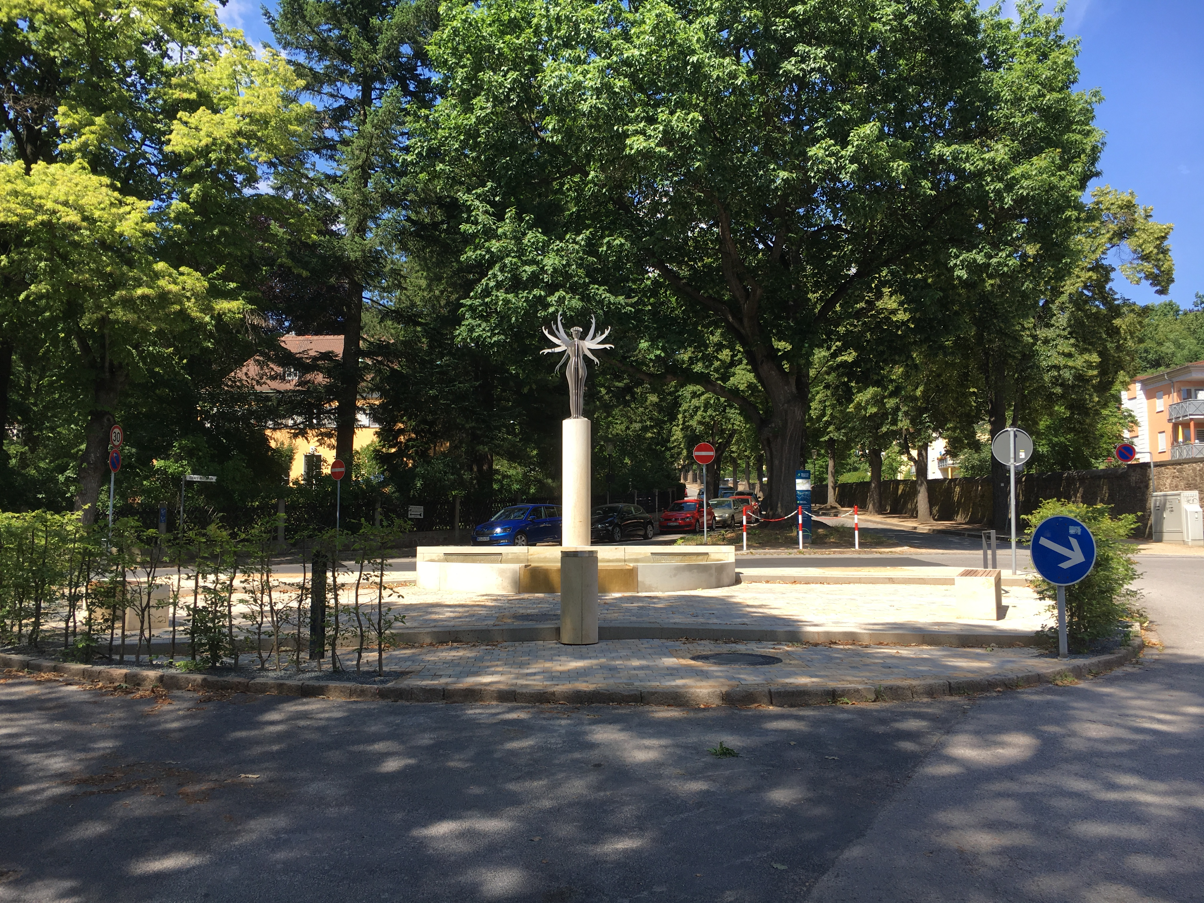 Radebeul Eduard-Bilz-Platz, Bilz-Brunnenanlage mit der Nymphe, 2017